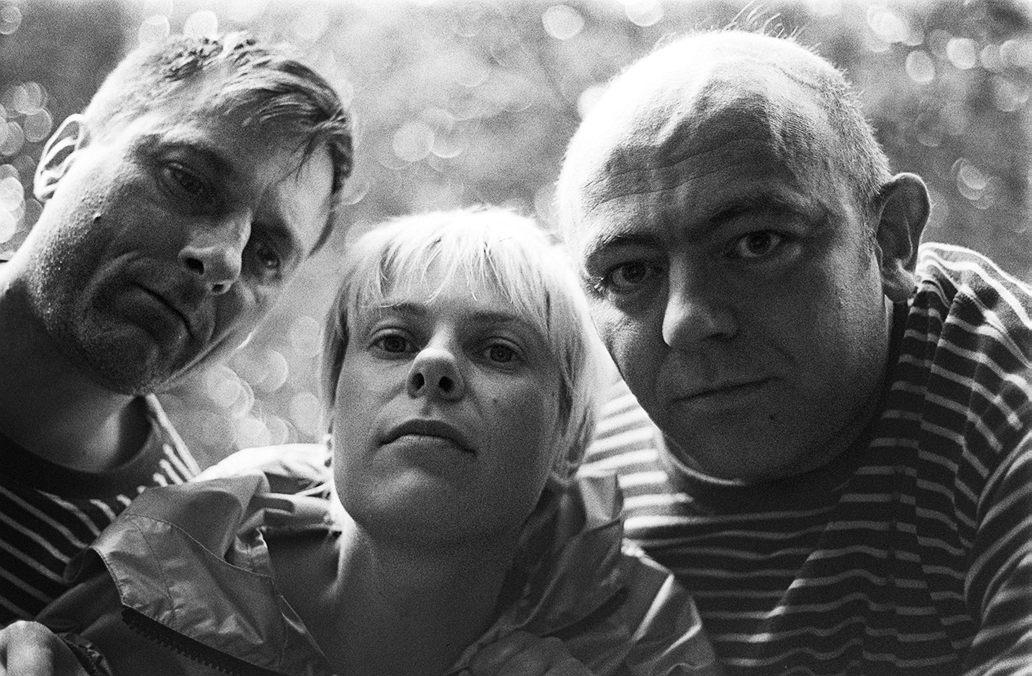 Ectogram - Maeyc Hewitt, Ann Mattews, Alan Holmes